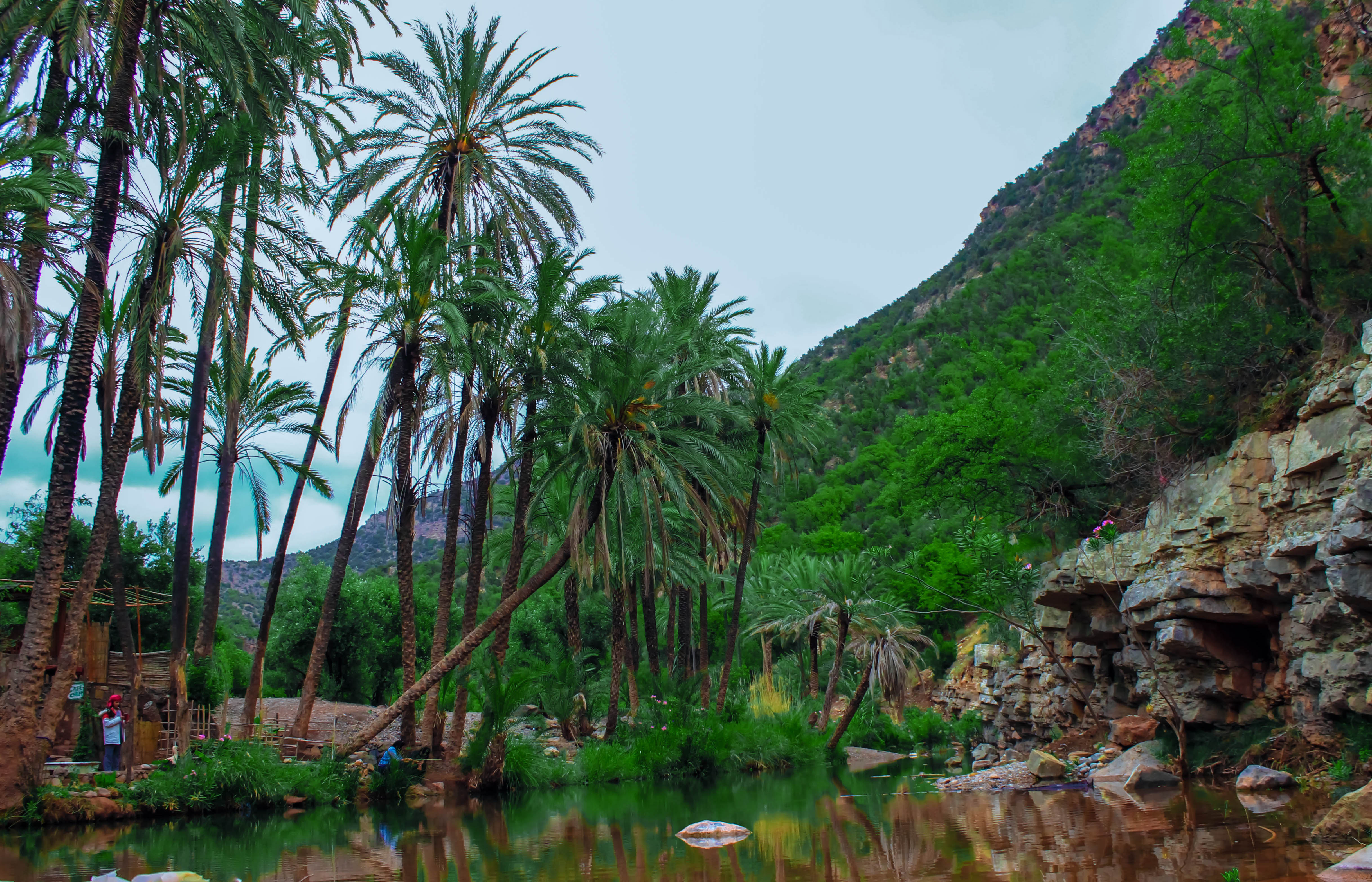 Paradise Valley Province d'Agadir-Ida-Ou Tanane